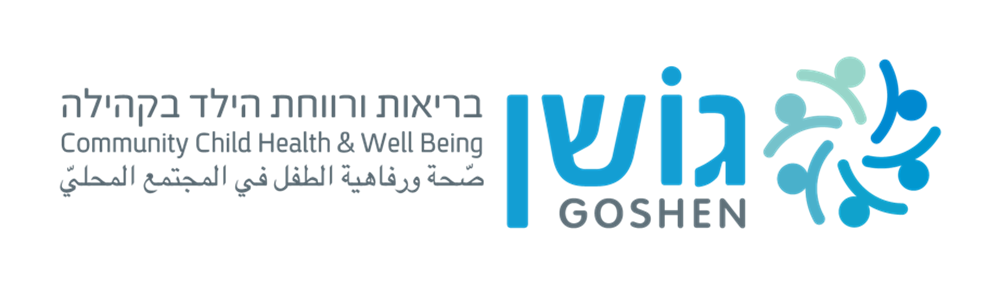 עמותת גושן